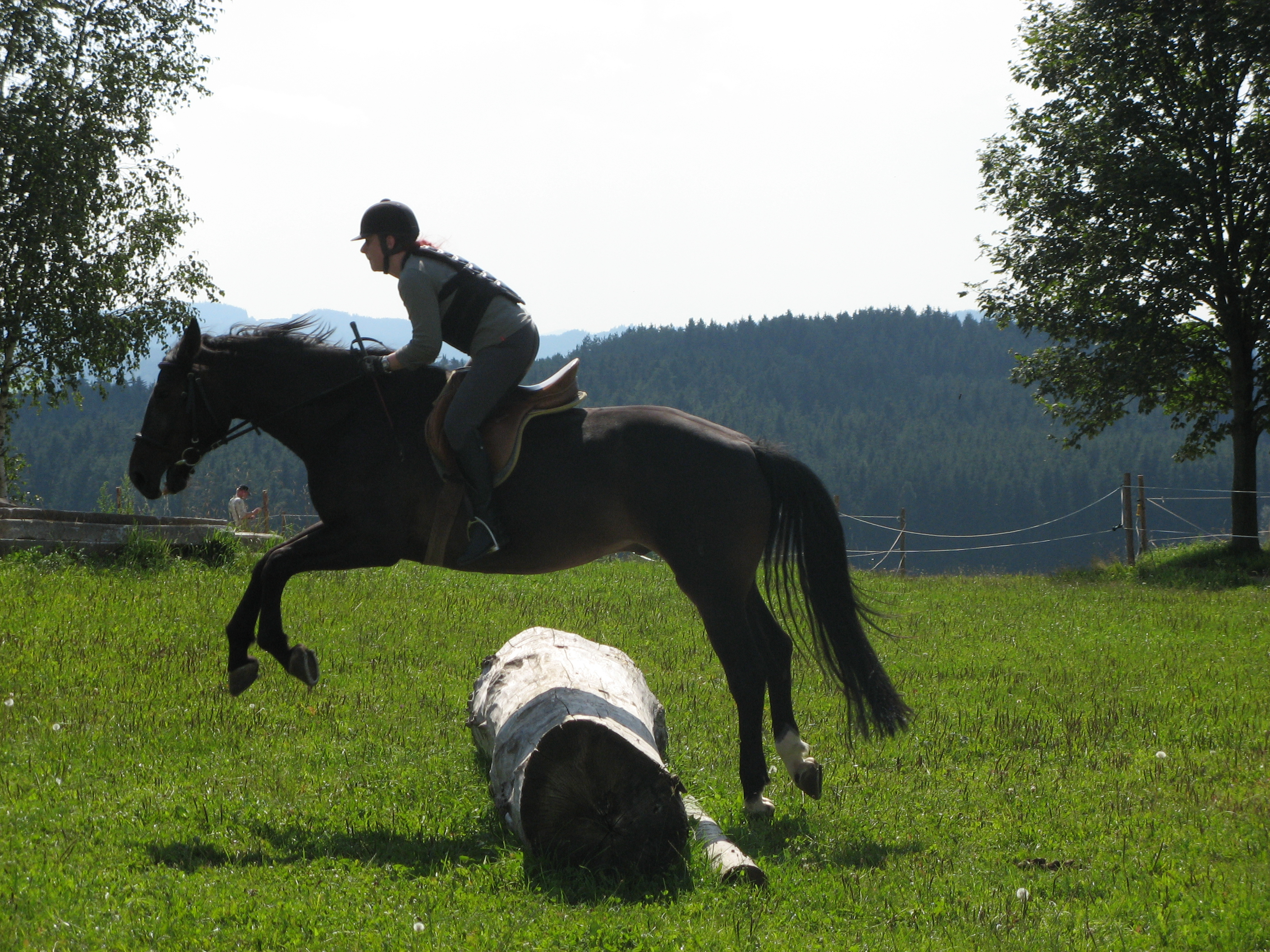 Festes Hindernis beim Vielseitigkeitsreiten. Tschechisches Warmblut.